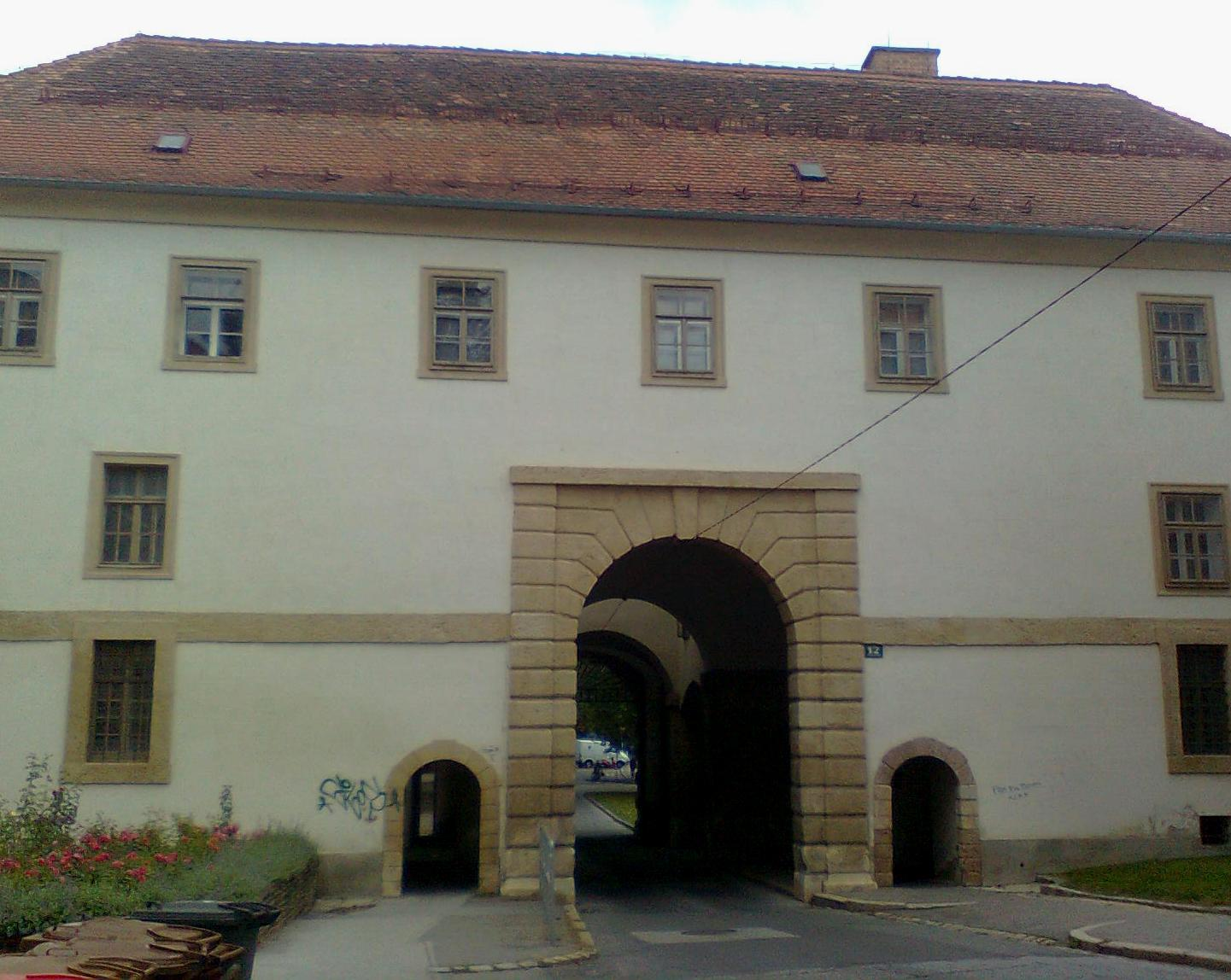 Paulustor Graz, Ansicht von der Paulustorgasse aus